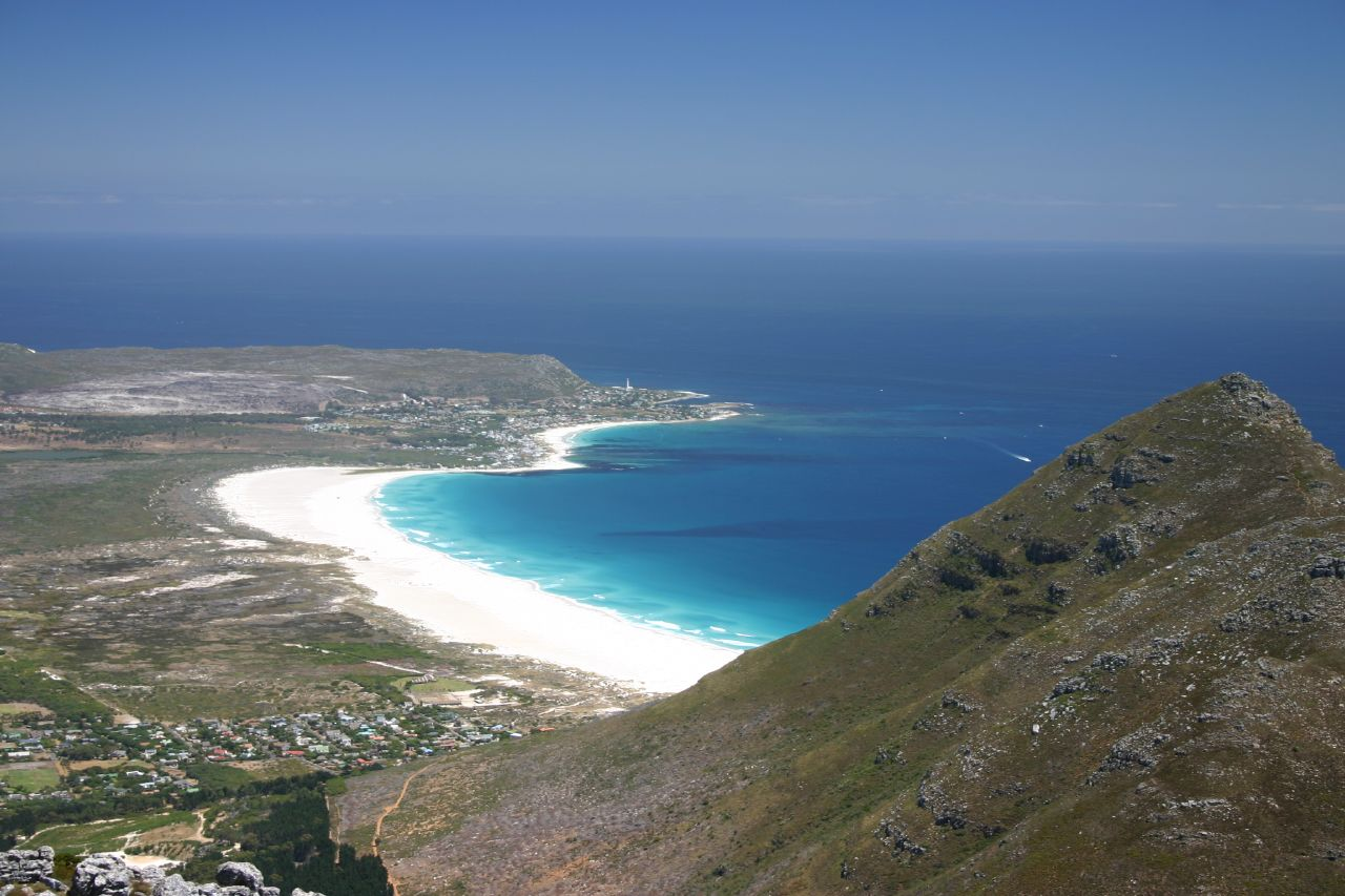 Noordhoek Beach from Nordhoek Peak